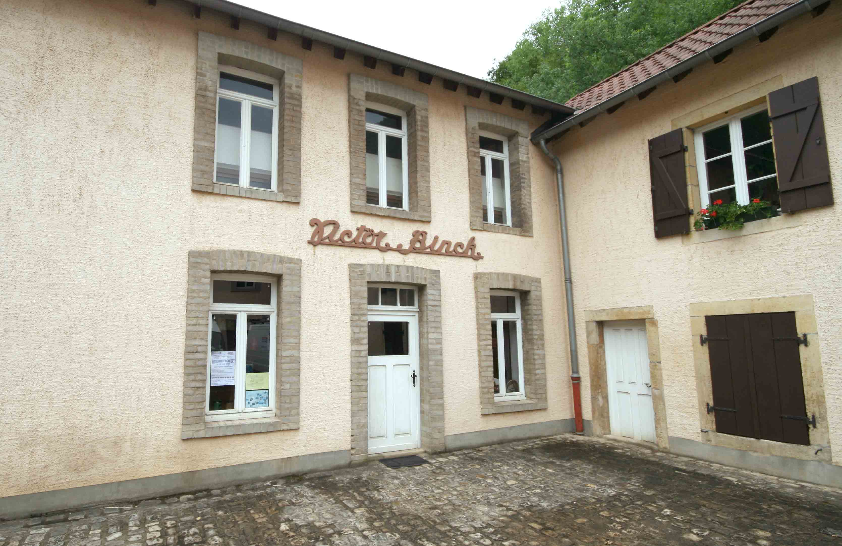 D'Épicerie Binck am Fond-de-Gras.